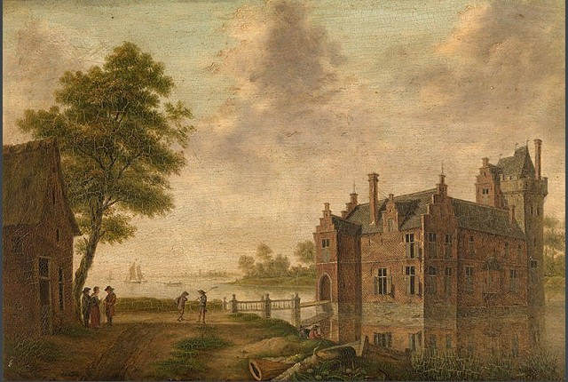 Dit kasteel, gelegen in de Neercauter, aldaer bij de Senne bestond uit een groot steynehuys van plaîsance, alomme omwaetert en den uytten waeter opgemetst ende staende in breede hofgrachten. Het omwaterde kasteel heete : Carmosteyn, Kermansteyn, Kermanshuys. Aannemelijk is dat het goed zijn naam te danken heeft aan de oude adellijke Mechelse familie Kar- of Kerremans, welke eeuwen lang er in bezit van was. Van den beginne af zou het een stenen bouw zijn geweest, met bijvoeging van de naam van de bezitters, werd dat van af de 13de eeuw Karmansteyn, en vervolgens bij verbastering Carmosteyn.